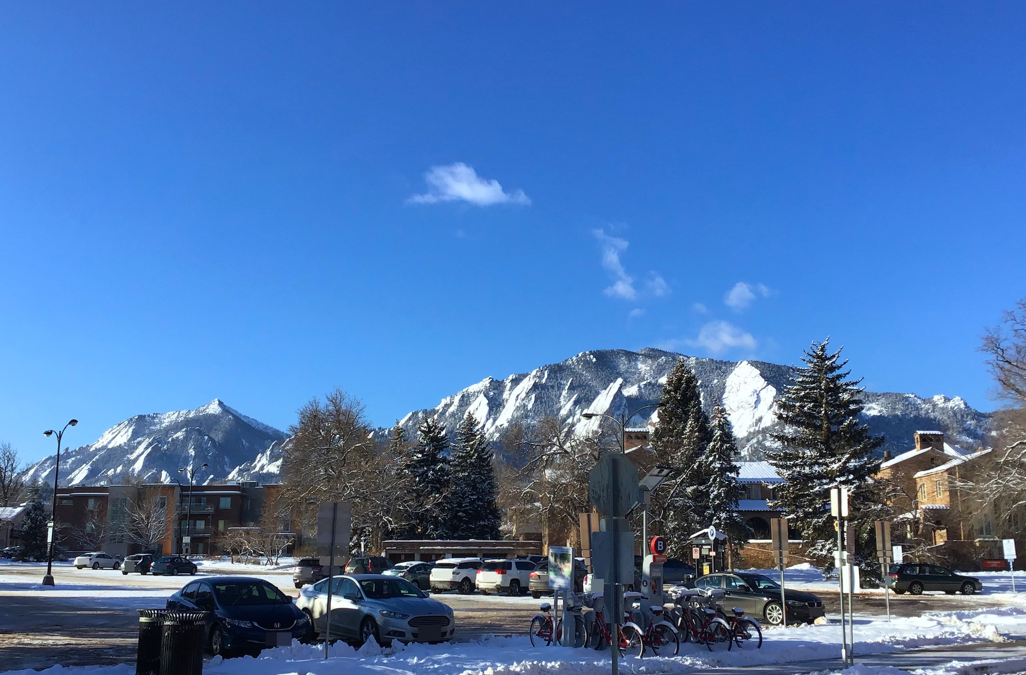 Rocky Mountains form The University of Colorado at Boulder